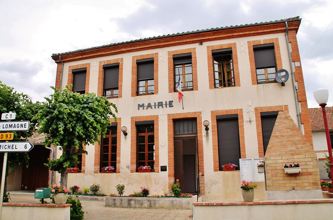 La Mairie